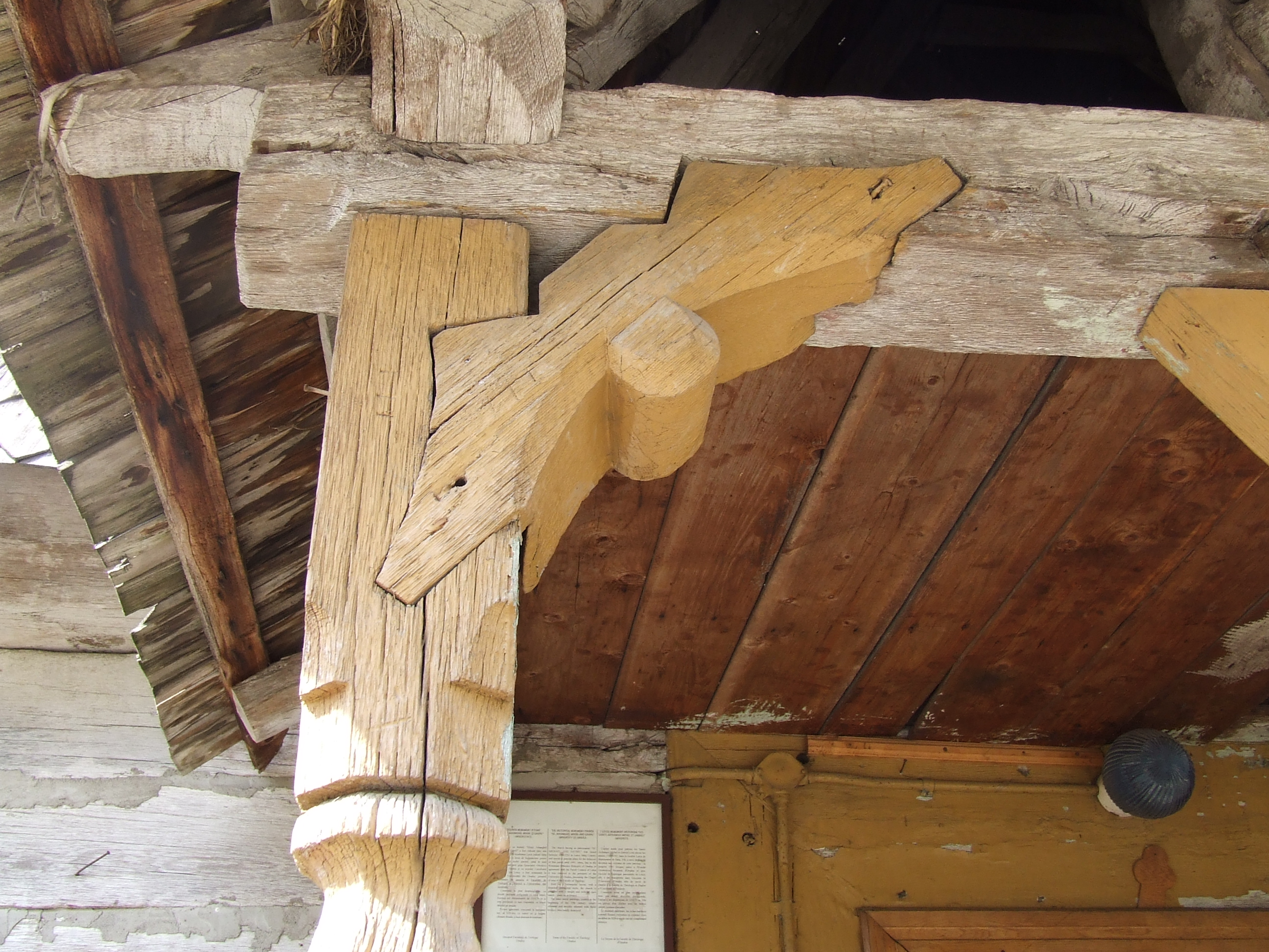 Îmbinare IV, Biserica de lemn Sf Arhangheli din Letca, jud. Sălaj